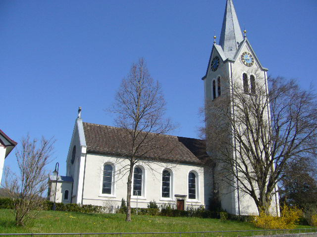 Aufnahme der ref. Kirche in Müllheim TG